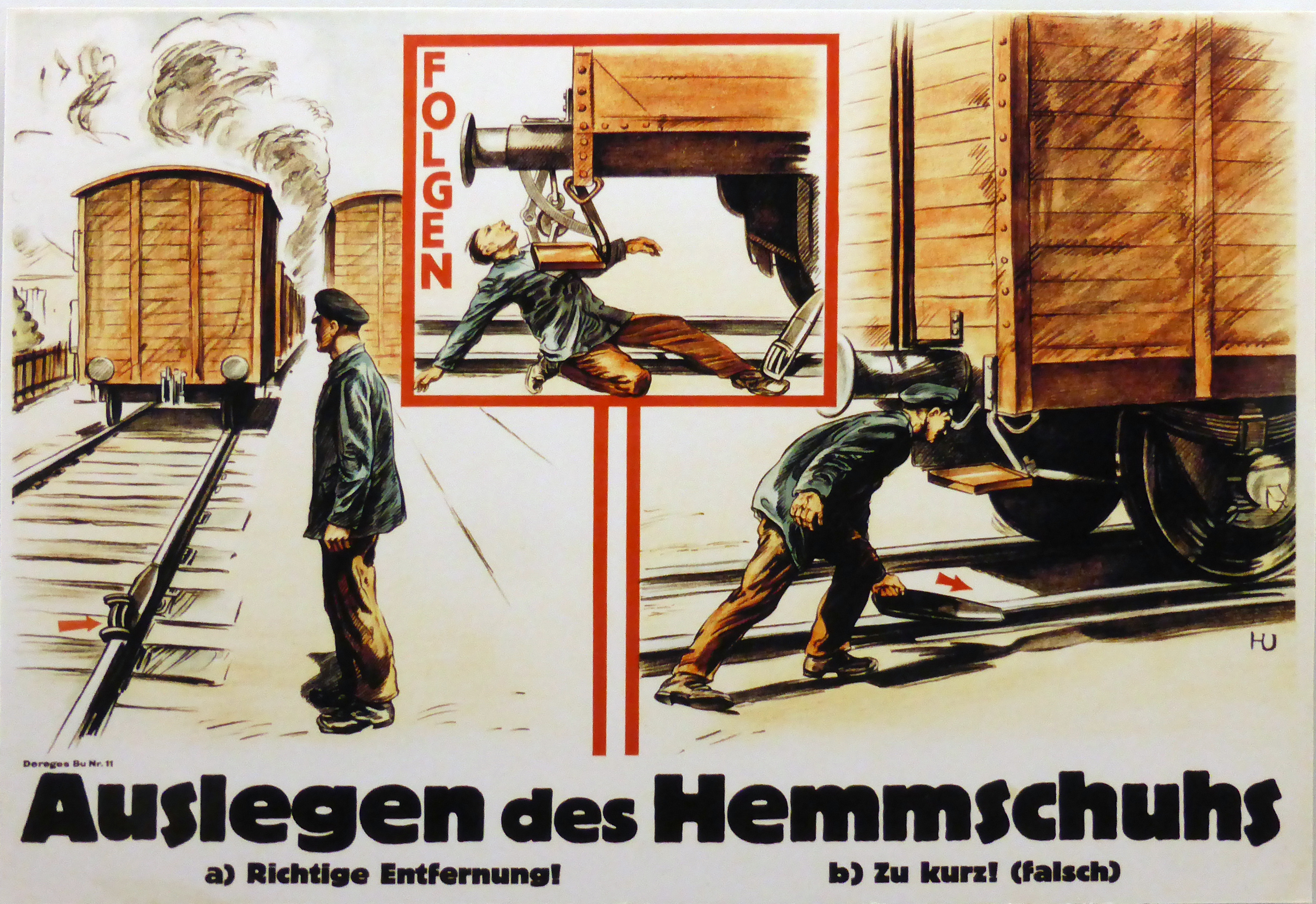 Plakat um 1940 "Auslegen des Hemmschuhs". Ausgestellt im Museum sächsisch-böhmisches Erzgebirge in Marienberg.